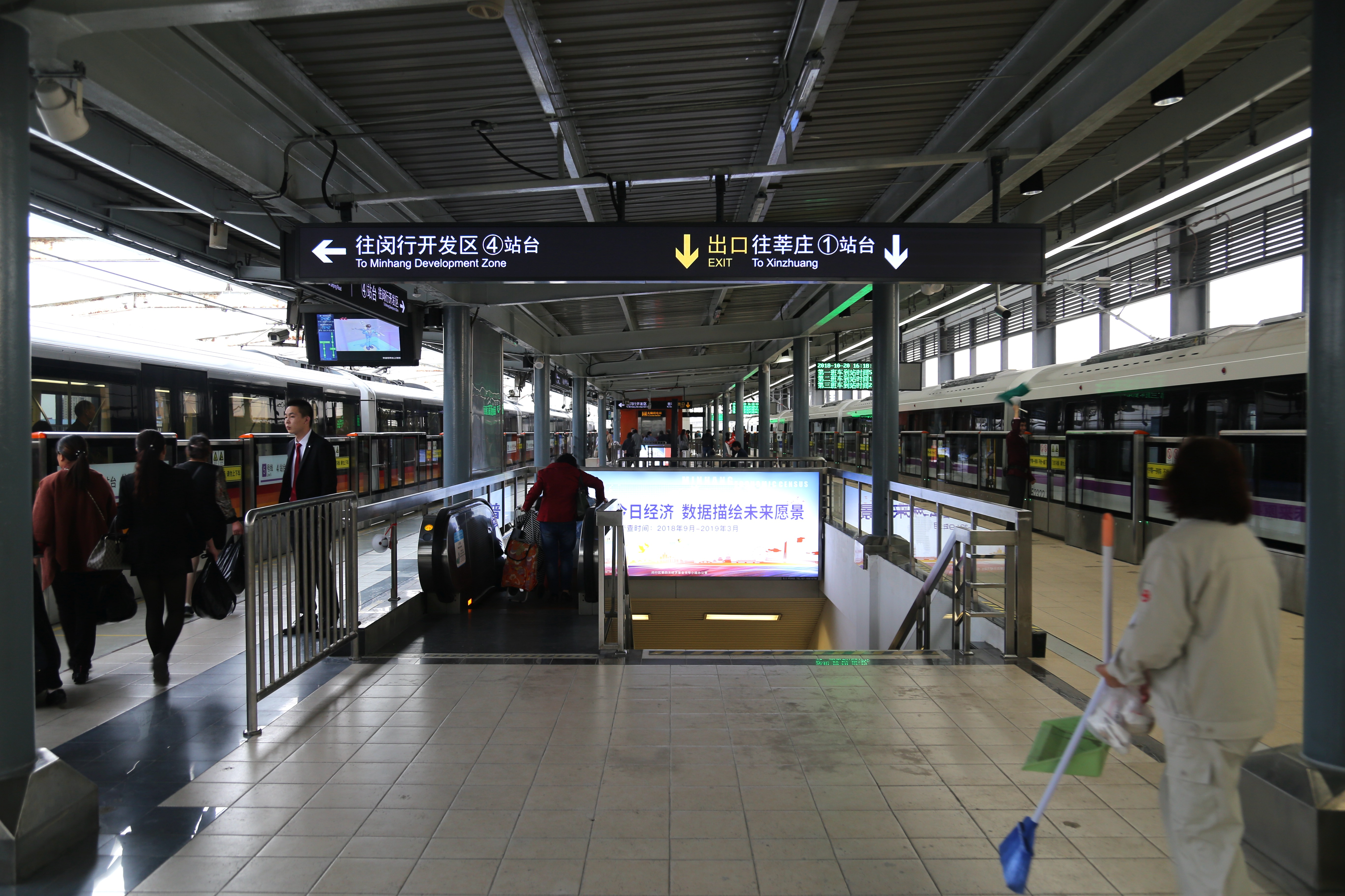 东川路站站台，2018年